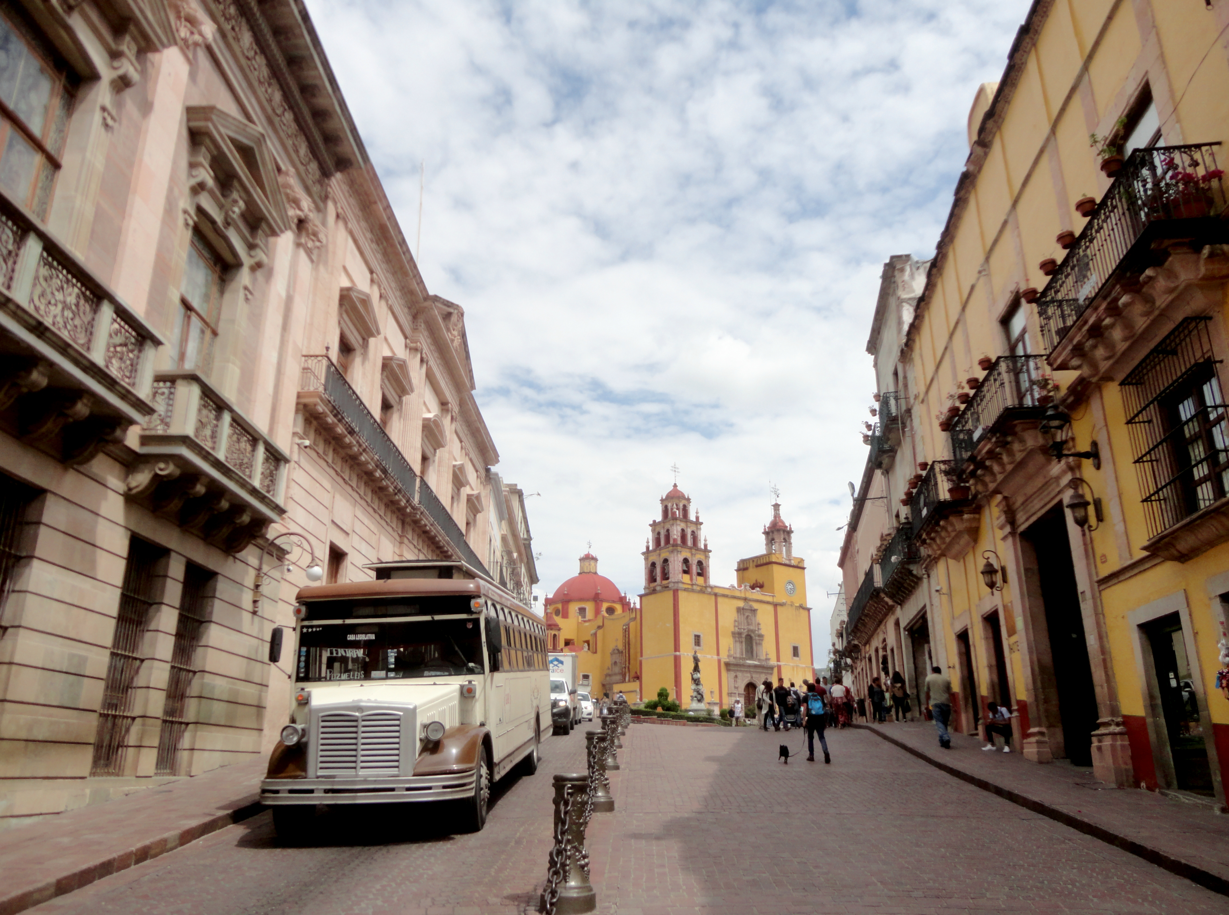 Plaza de la Paz, Guanajuato Capital, Guanajuato, México.